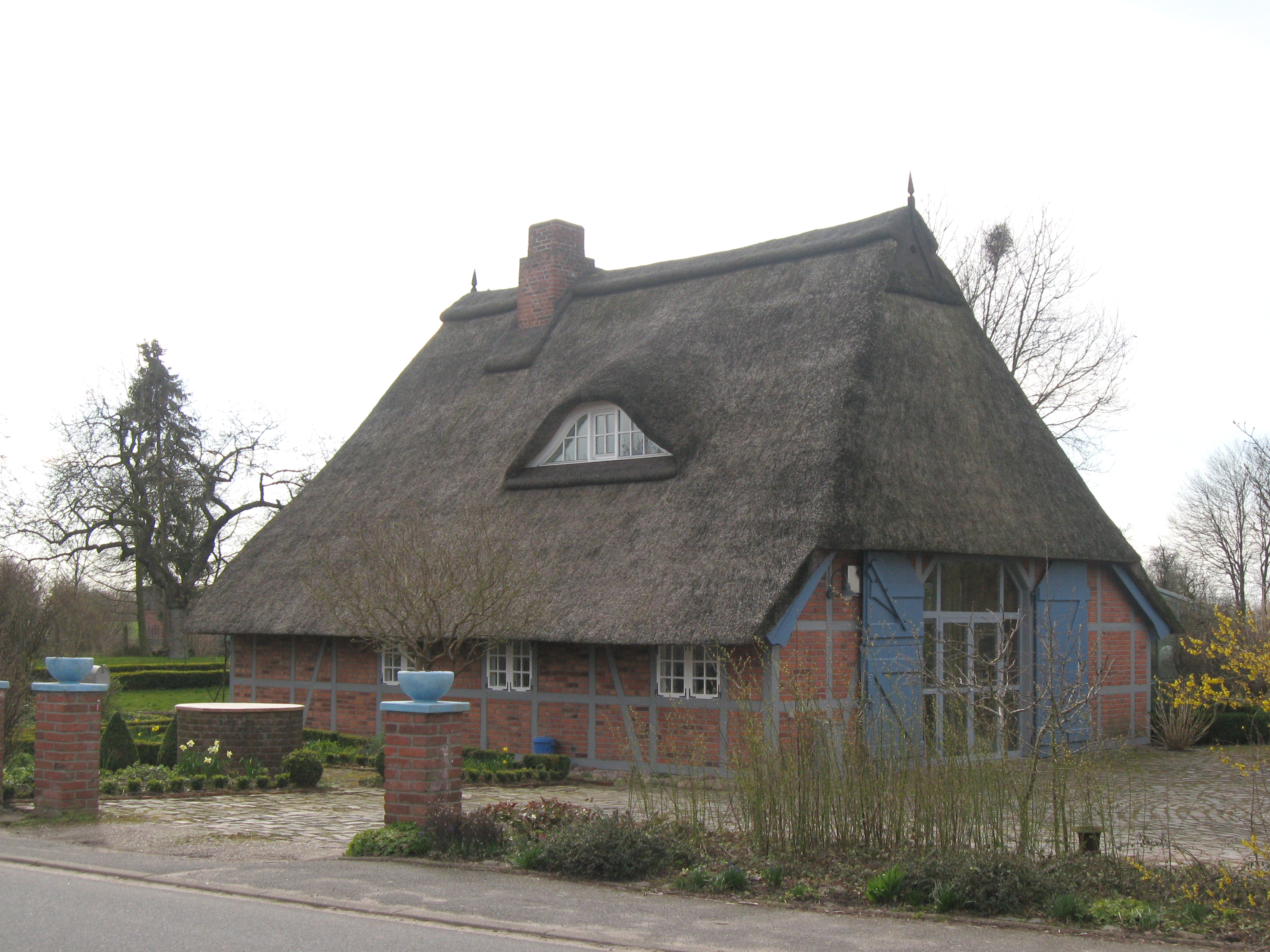 Reetdachhaus in Meddewade